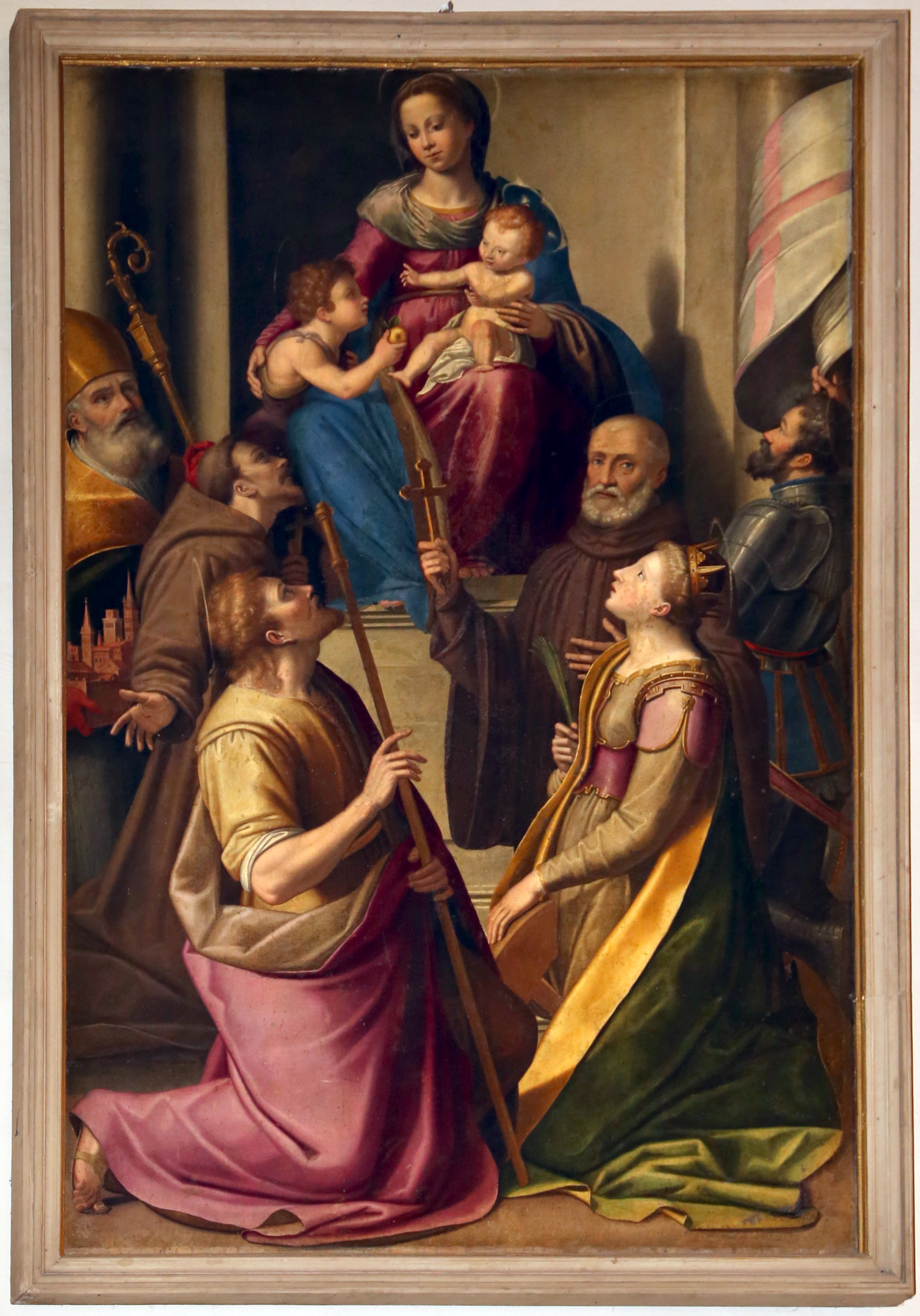 abbazia di San Mercuriale This is a photo of a monument which is part of cultural heritage of Italy.